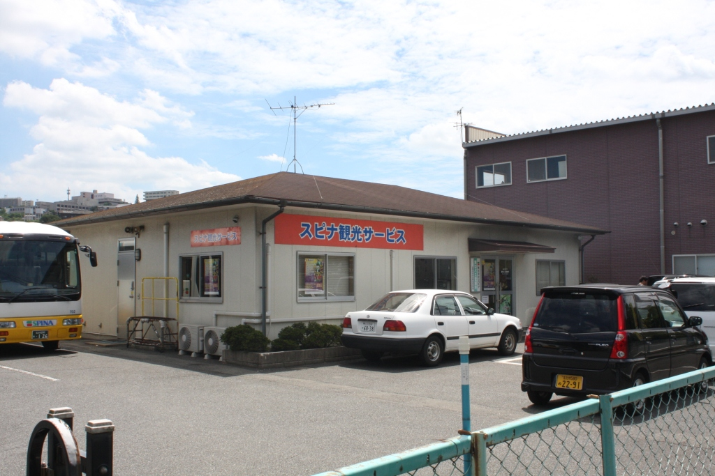 株式会社スピナ 貸切バス営業所